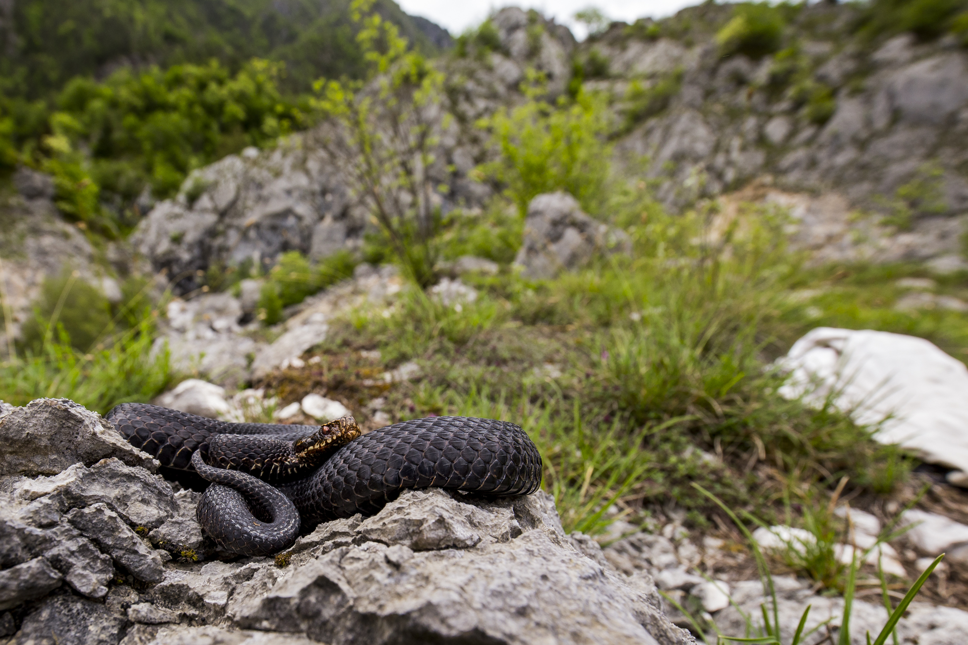 Parco naturale delle Dolomiti Friulane (Q683241)